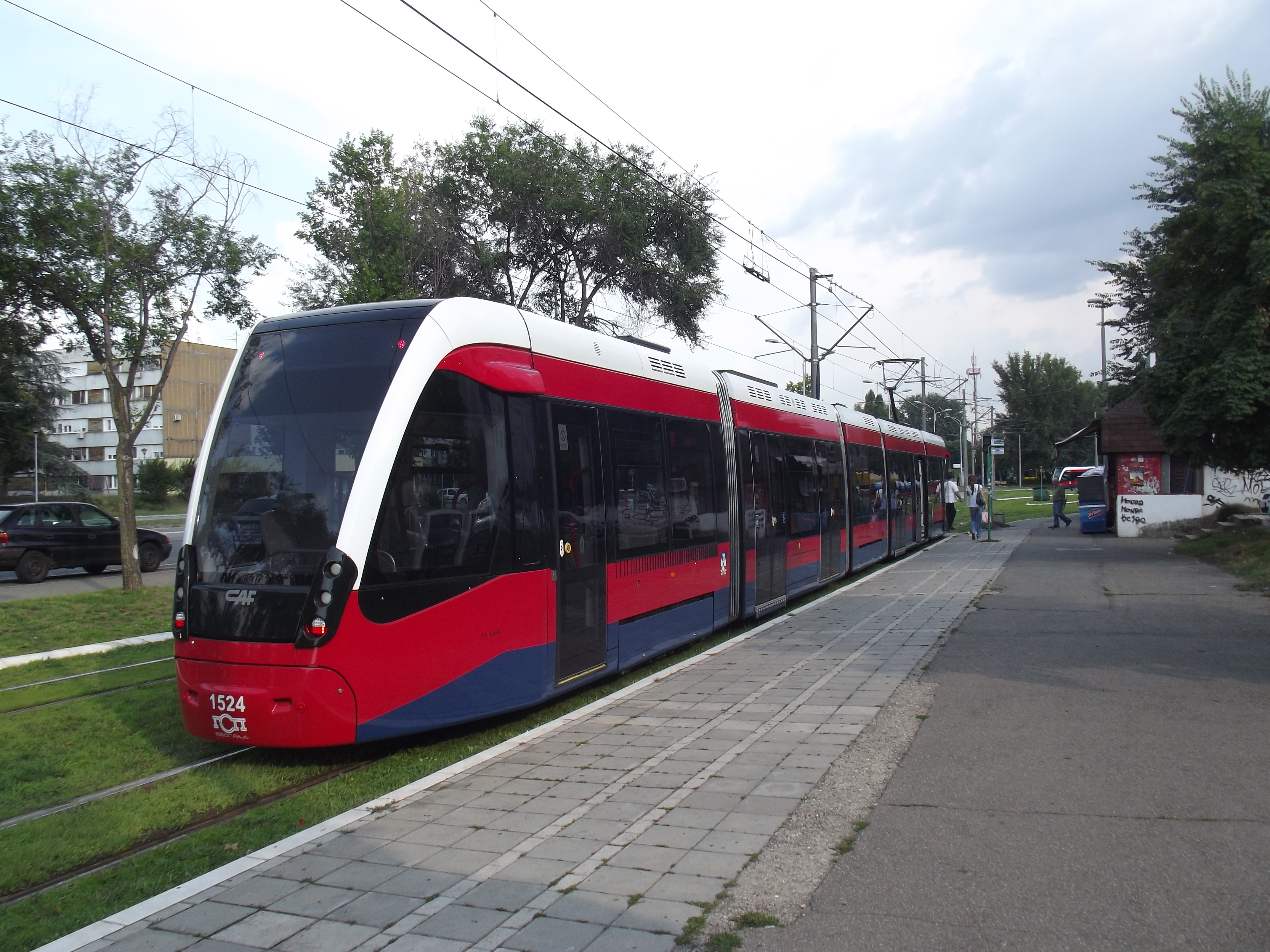 Trams bij het eindpunt Blok 45